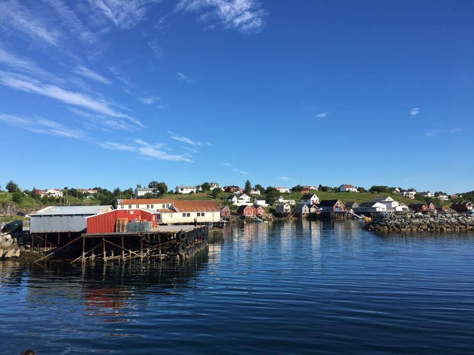 Sørarnøy havn i Gildeskål kommune, Nordland.